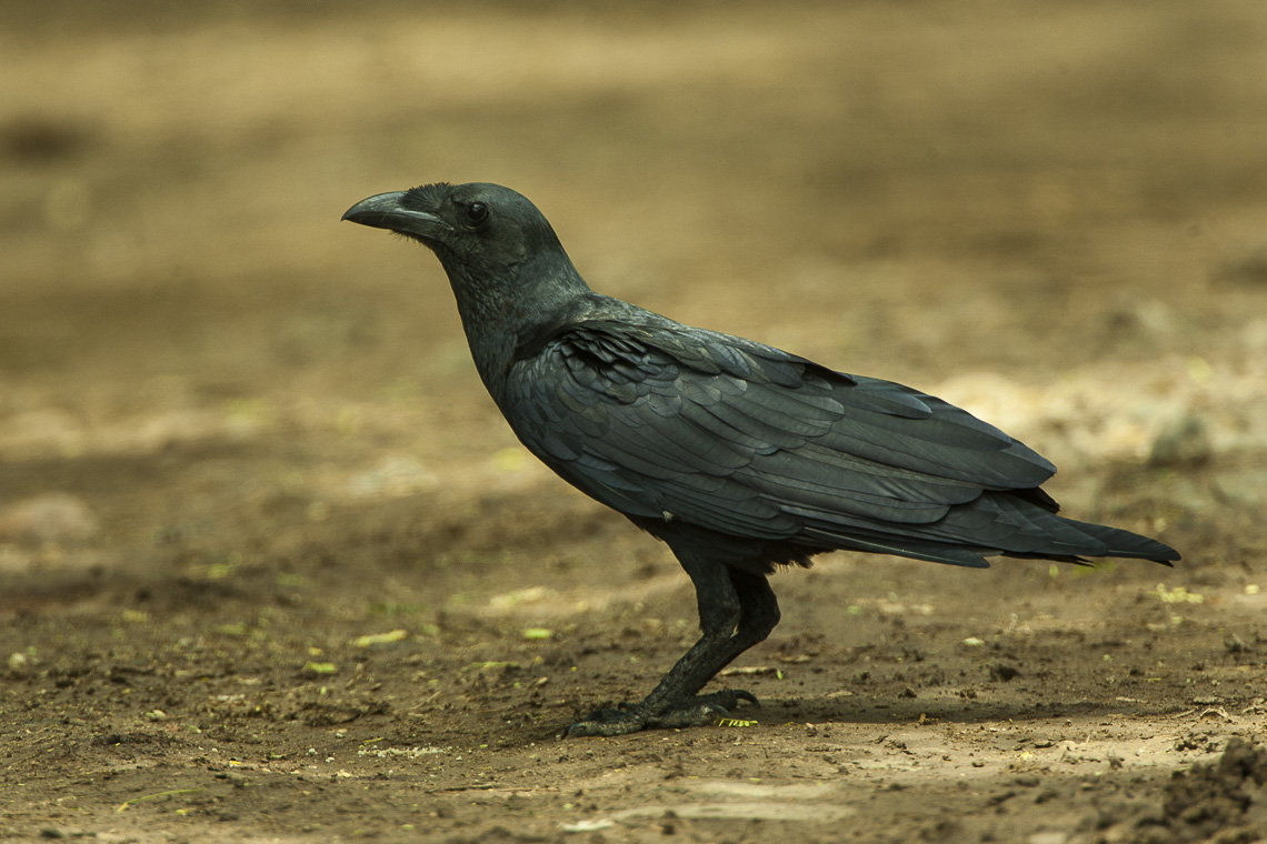 Fan-tailed Raven - Shaba - Kenya_06_7594